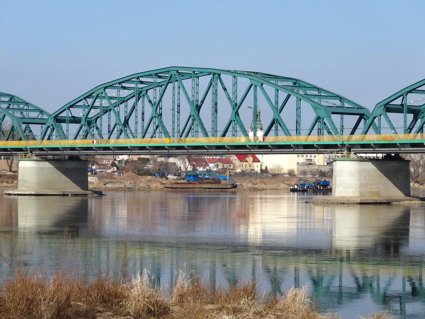 Most Fordoński im. Rudolfa Modrzejewskiego nad Wisłą w Bydgoszczy-Fordonie